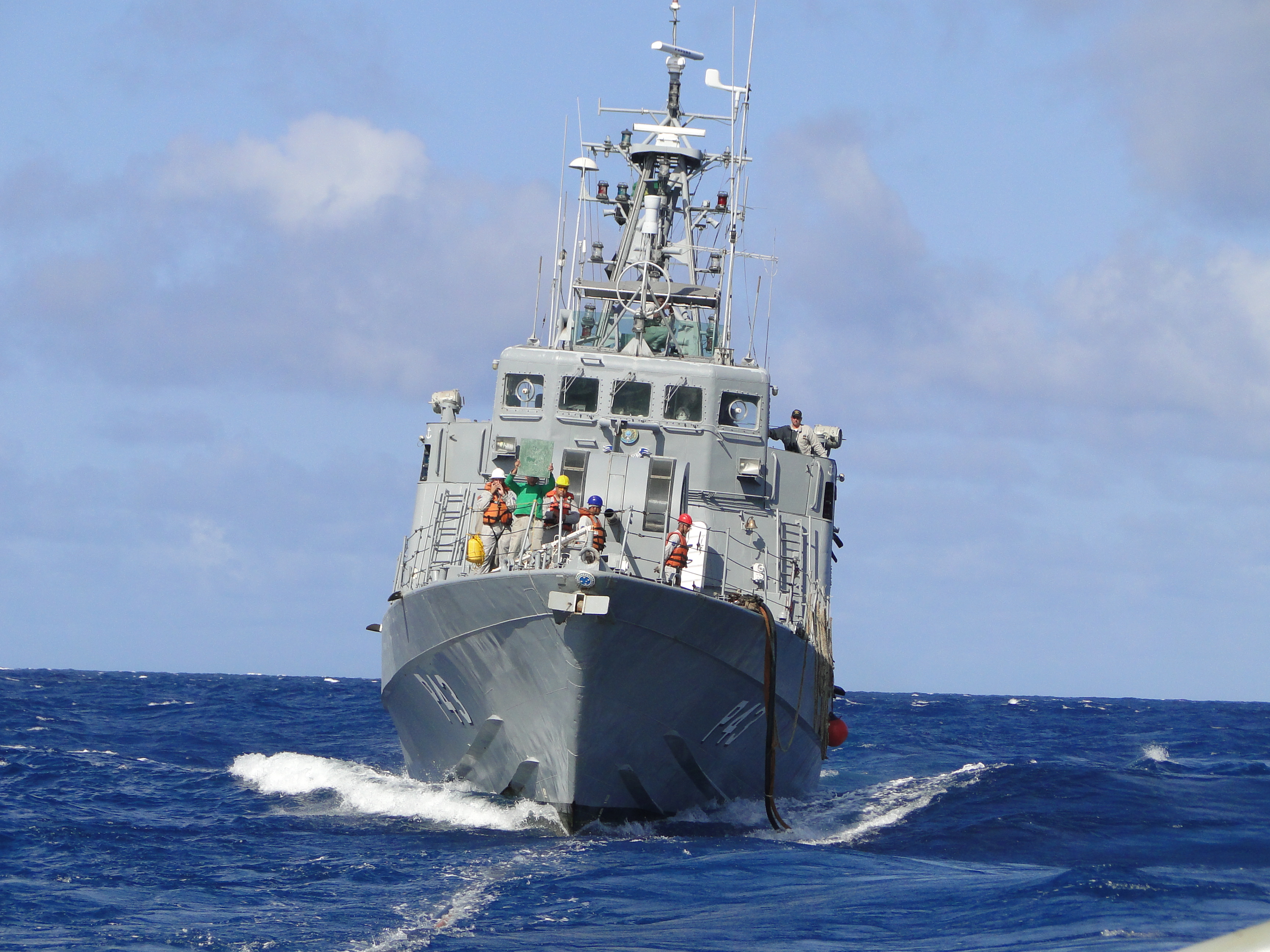 Arquivo liberado pela Marinha do Brasil através de projeto GLAM com Wiki Educação Brasil